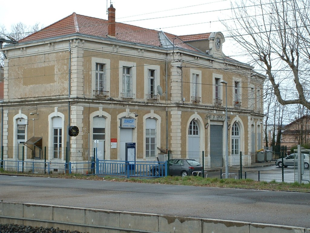 Gare SNCF de Givors-Canal, Rhône (69), France